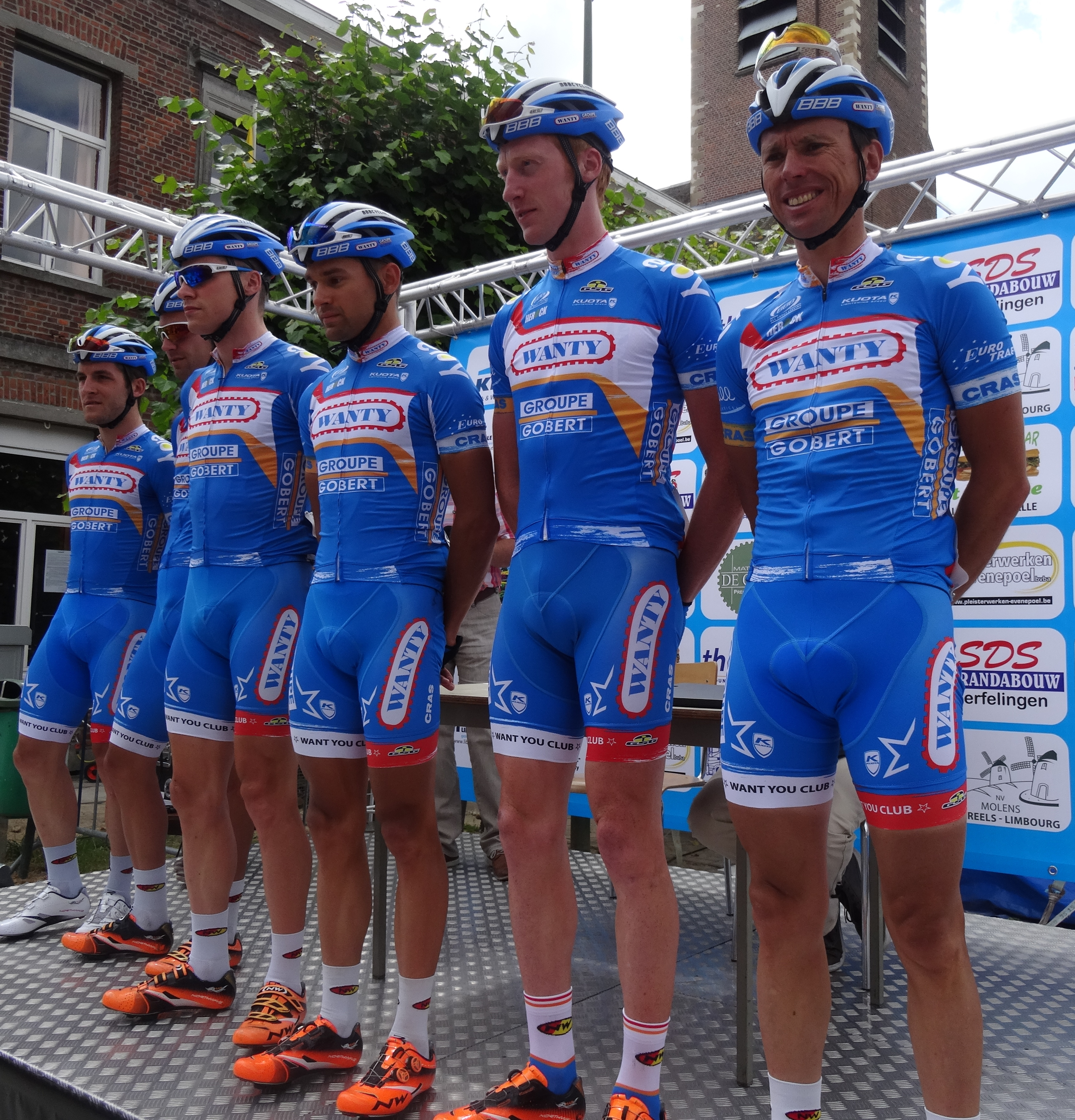 Reportage photographique réalisé le mercredi 25 juin à l'occasion du départ et de l'arrivée de l'Internationale Wielertrofee Jong Maar Moedig 2014 à Oetingen (Gooik), Belgique.